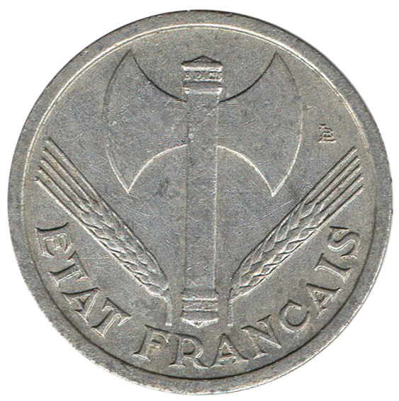 Avers 1 franc état français émise en 1942